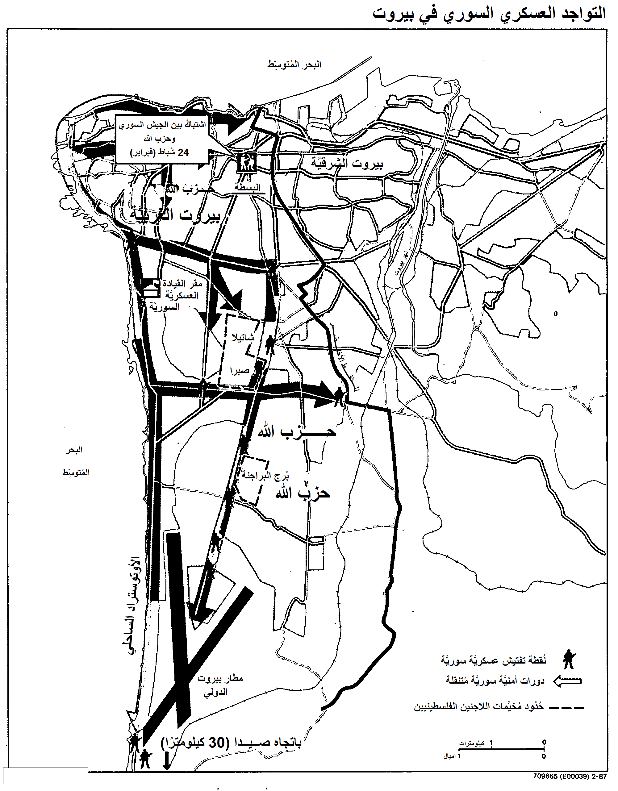 خريطة من أعداد وكالة المخابرات المركزيَّة الأمريكيَّة تُصوِّر مناطق تواجد حزب الله والجيش السوري في مدينة بيروت يوم 26 شُباط (فبراير) 1987م.